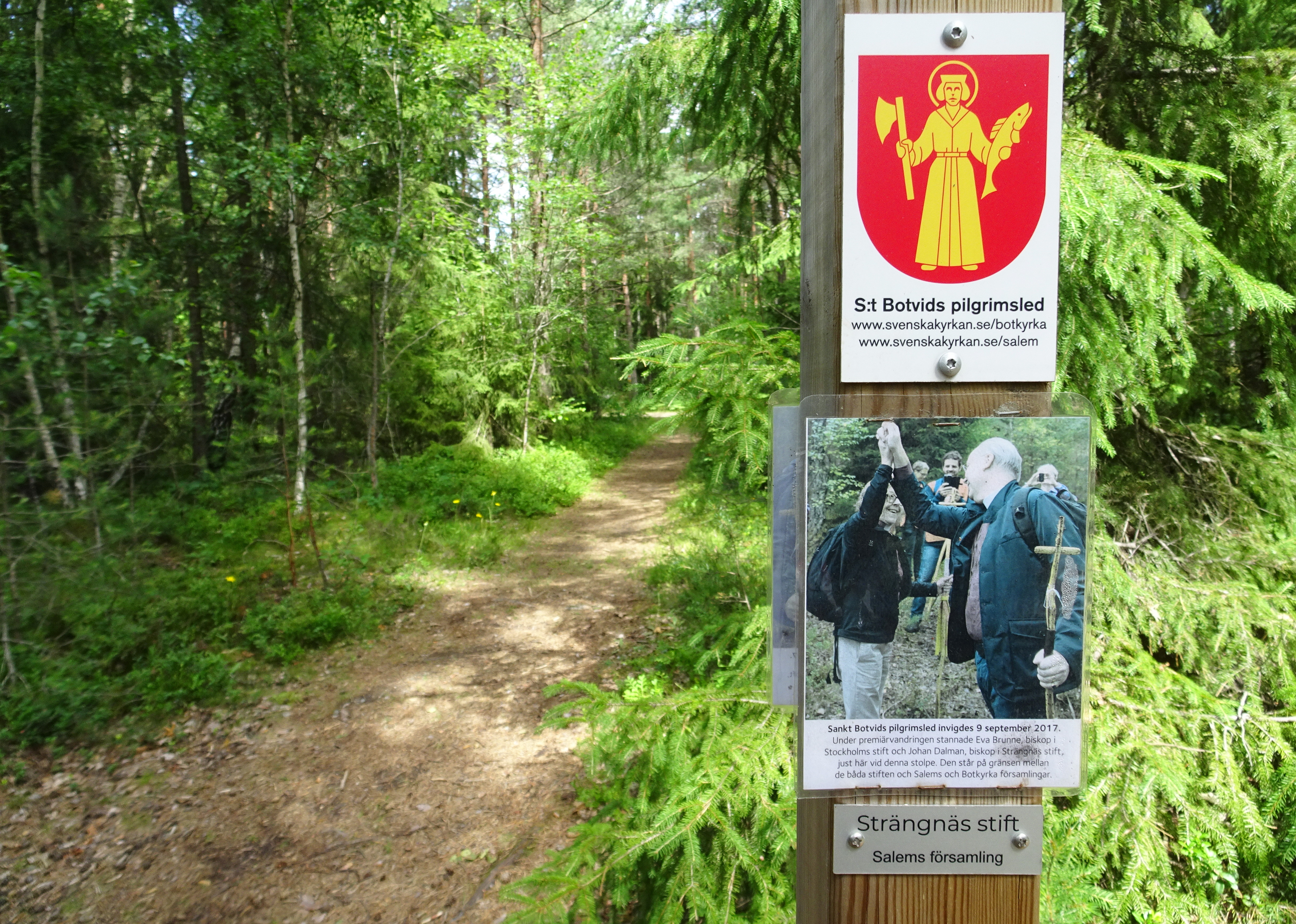 Sankt Botvids pilgrimspfad, gränsmarkering mellan Stockholms och Strängnäs stift